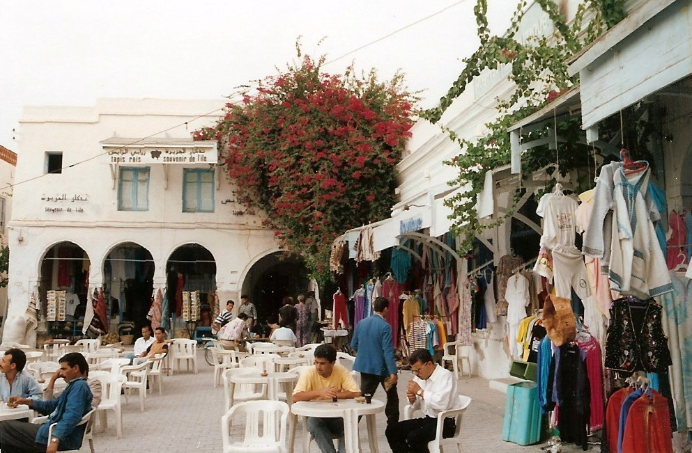 Café sur une place de Houmt Souk sur l'île de Djerba